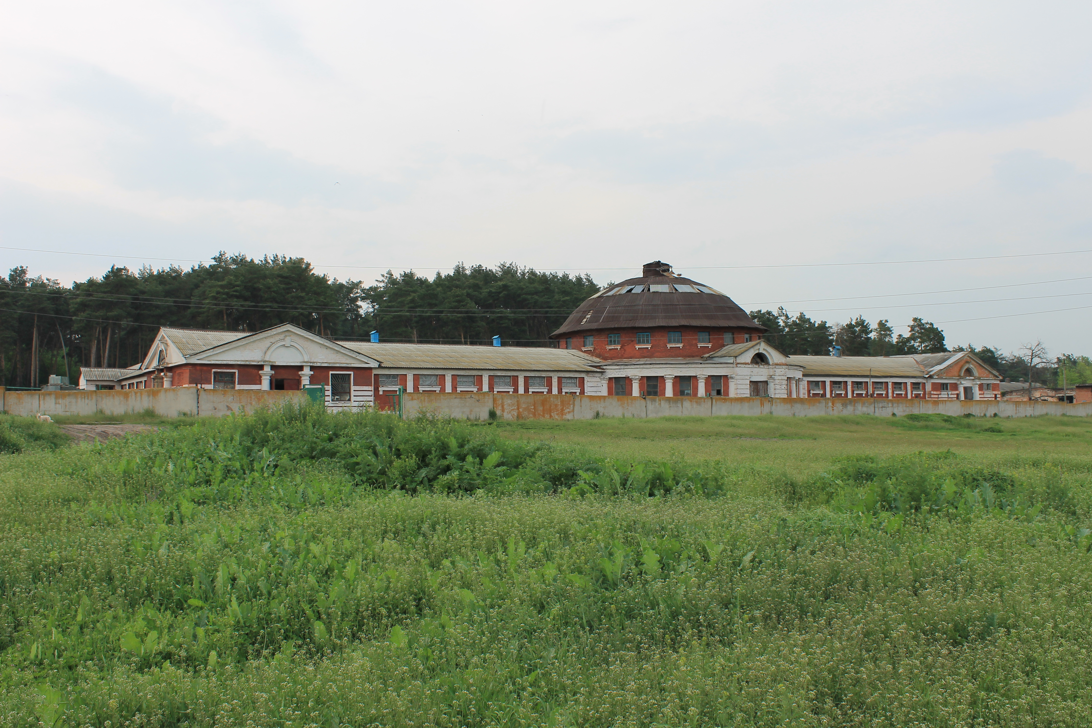 Харківський зооветеринарний інститут: манеж; Академмістечко, с.Мала Данилівка, Дергачівський р-н., Харківська обл.